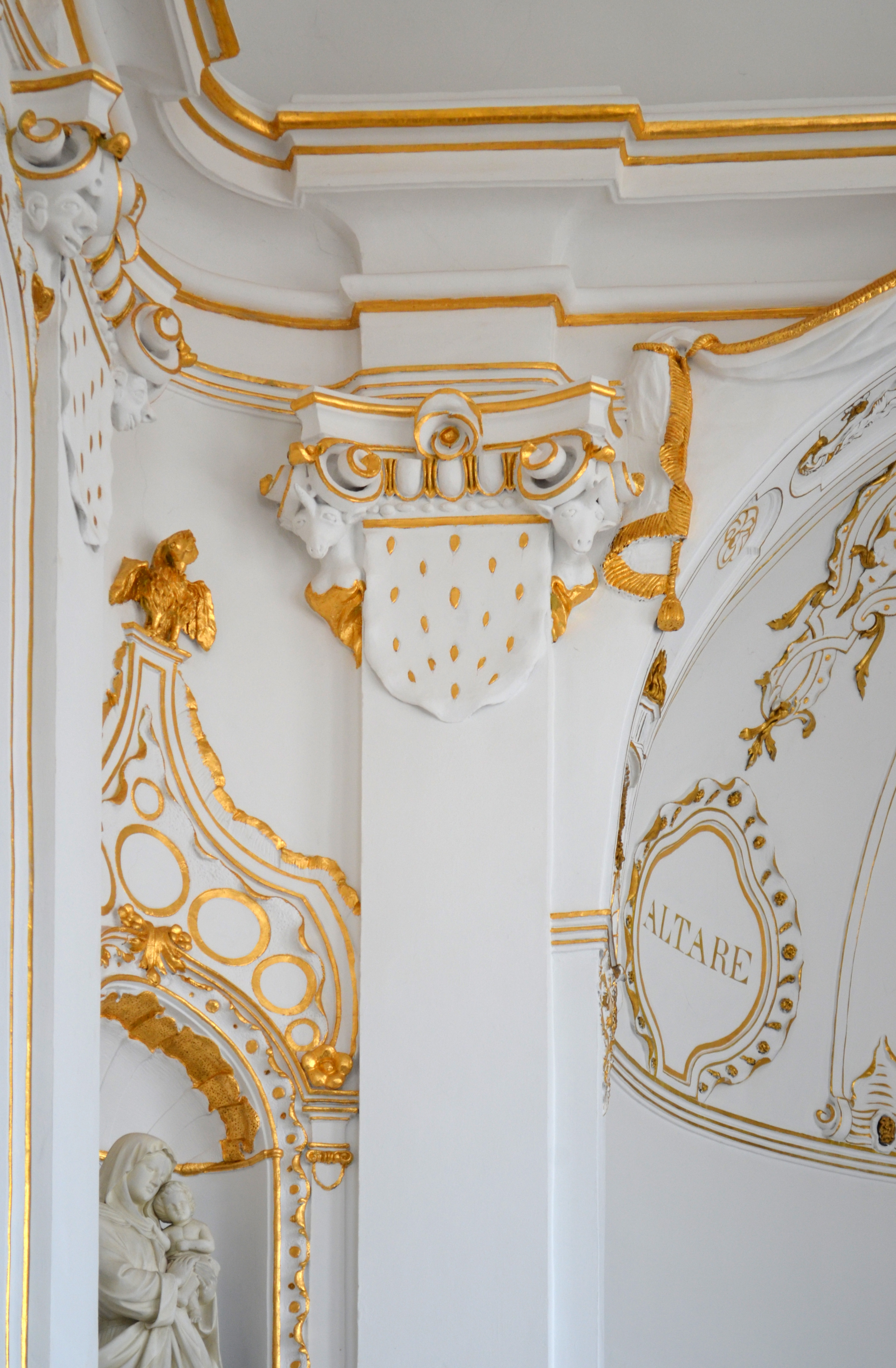 Innenansicht der Sankt Johannes-Baptist Enthauptungskapelle in Eupen-Nispert